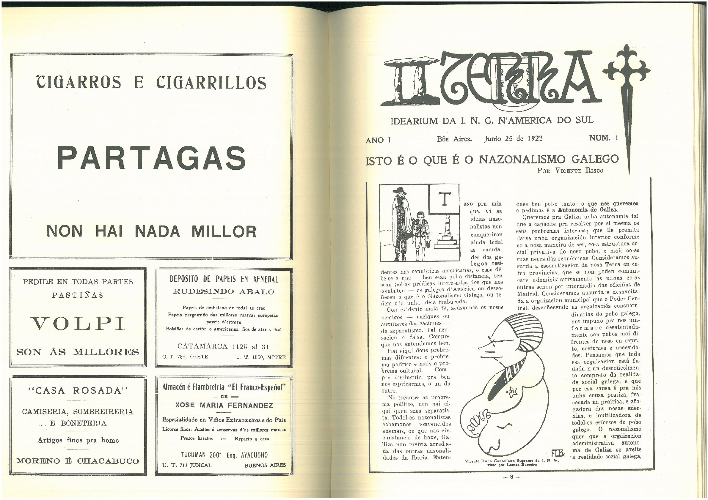 Revista Terra primeiro número.